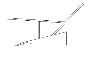 Araire quadrangulaire LE sep, l'age, le(s) mancheron(s) et la règle (lien entre le sep et l'age) forme plus ou moins un parralépipède